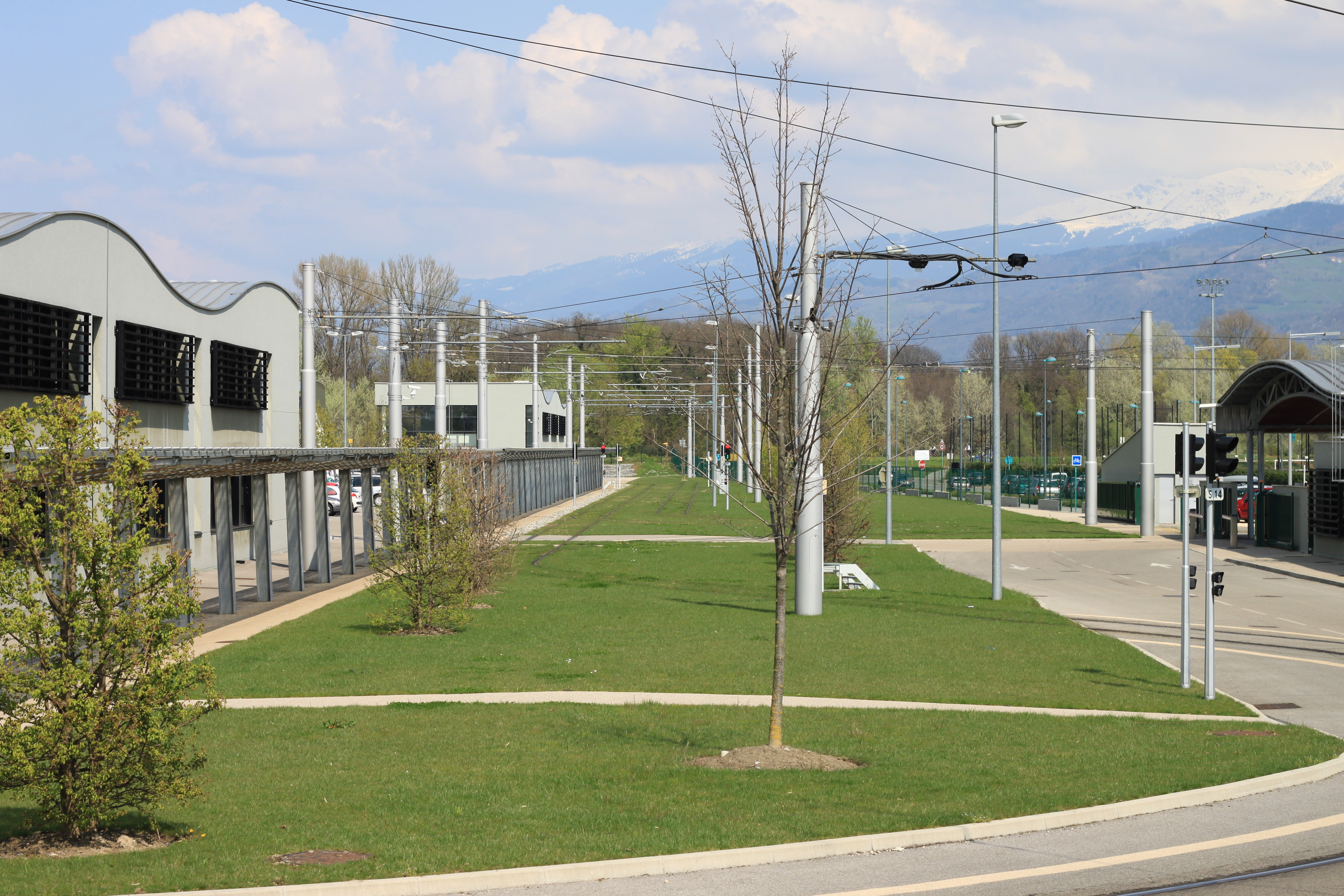 Déport de la Semitag à Gières